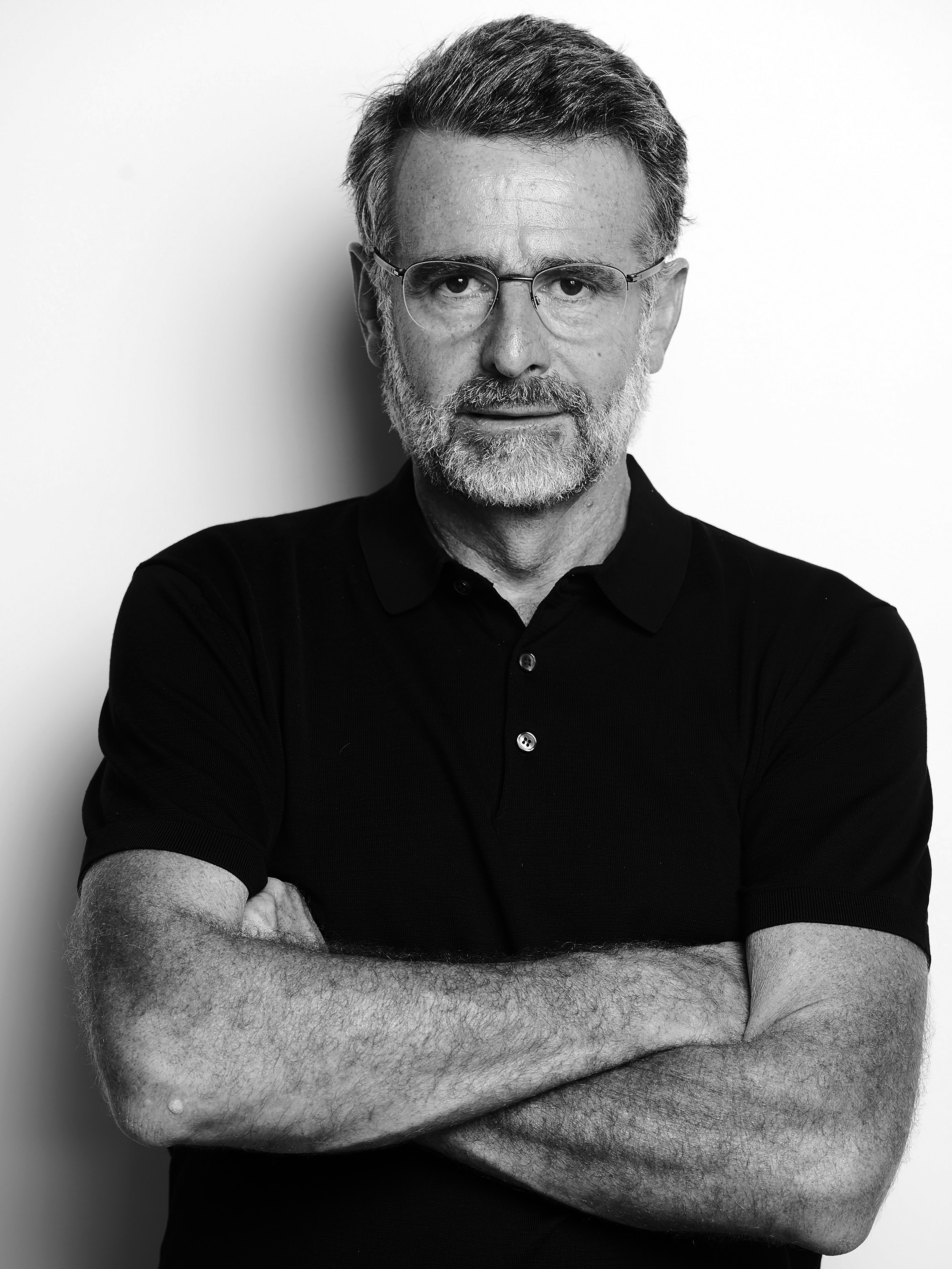 Portrait